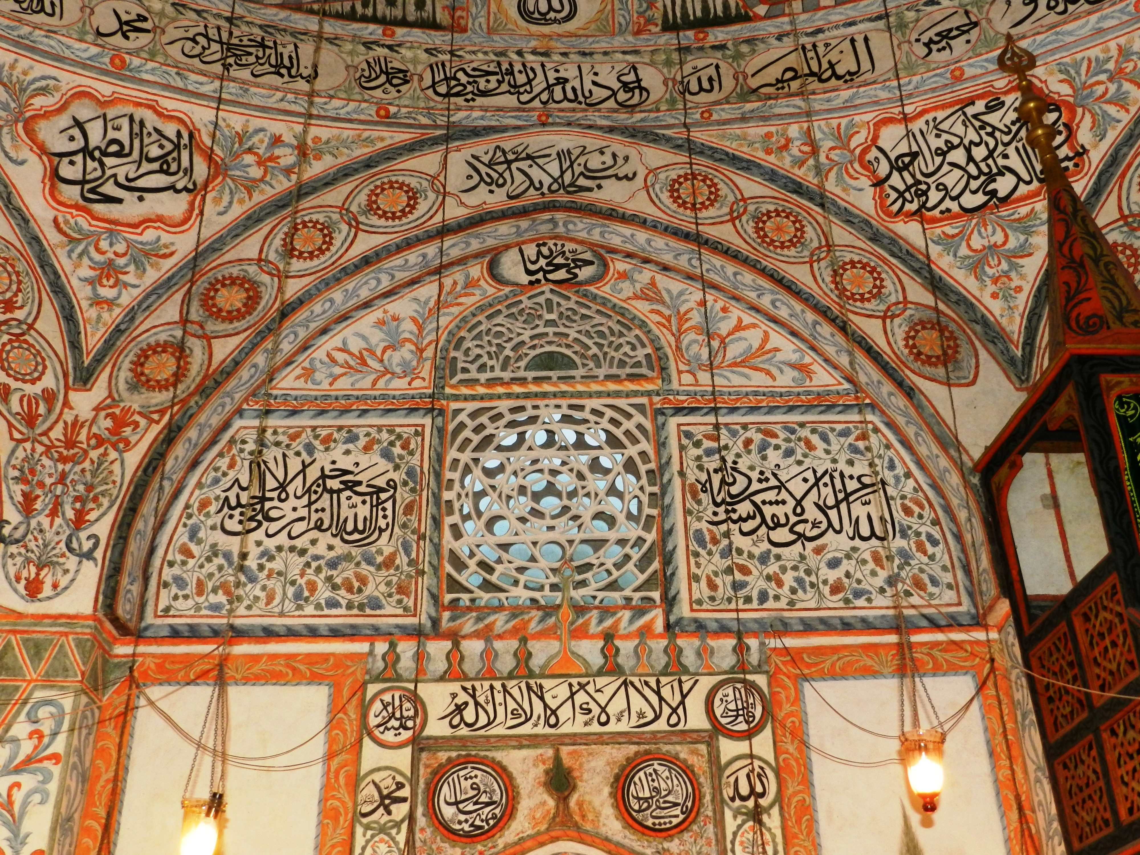 Kompleksi Xhamija e Hadumit